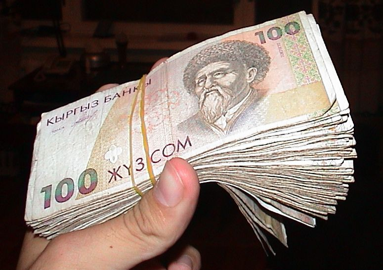 100 Som notes.